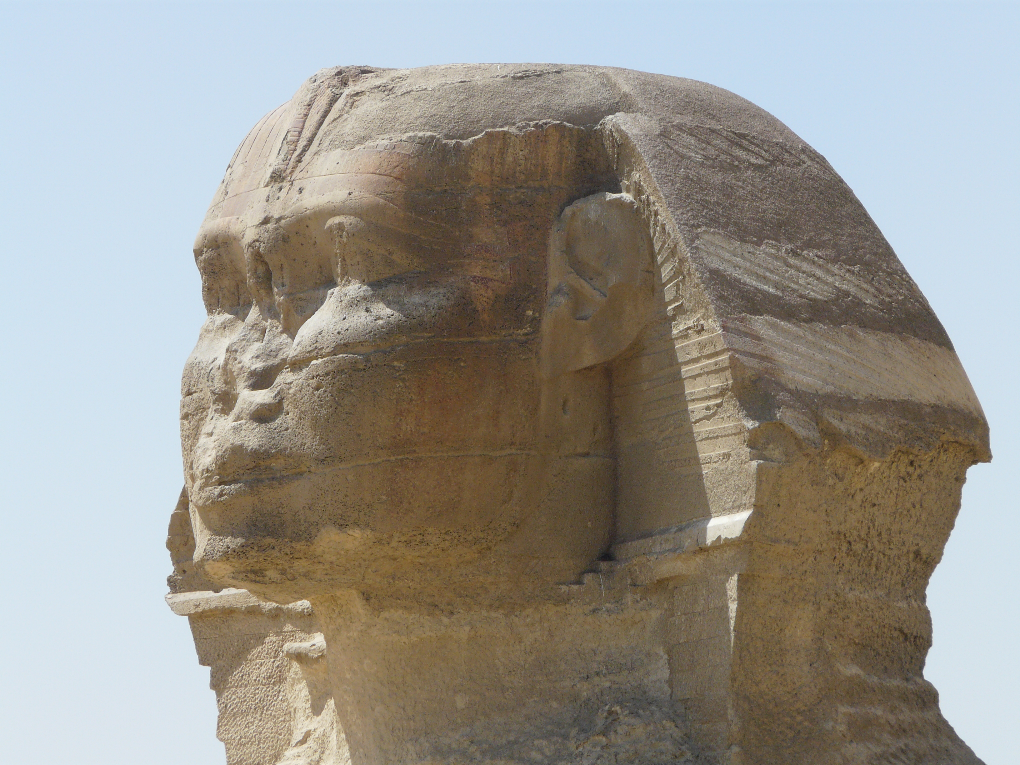 visage du grand Sphinx de Gizeh